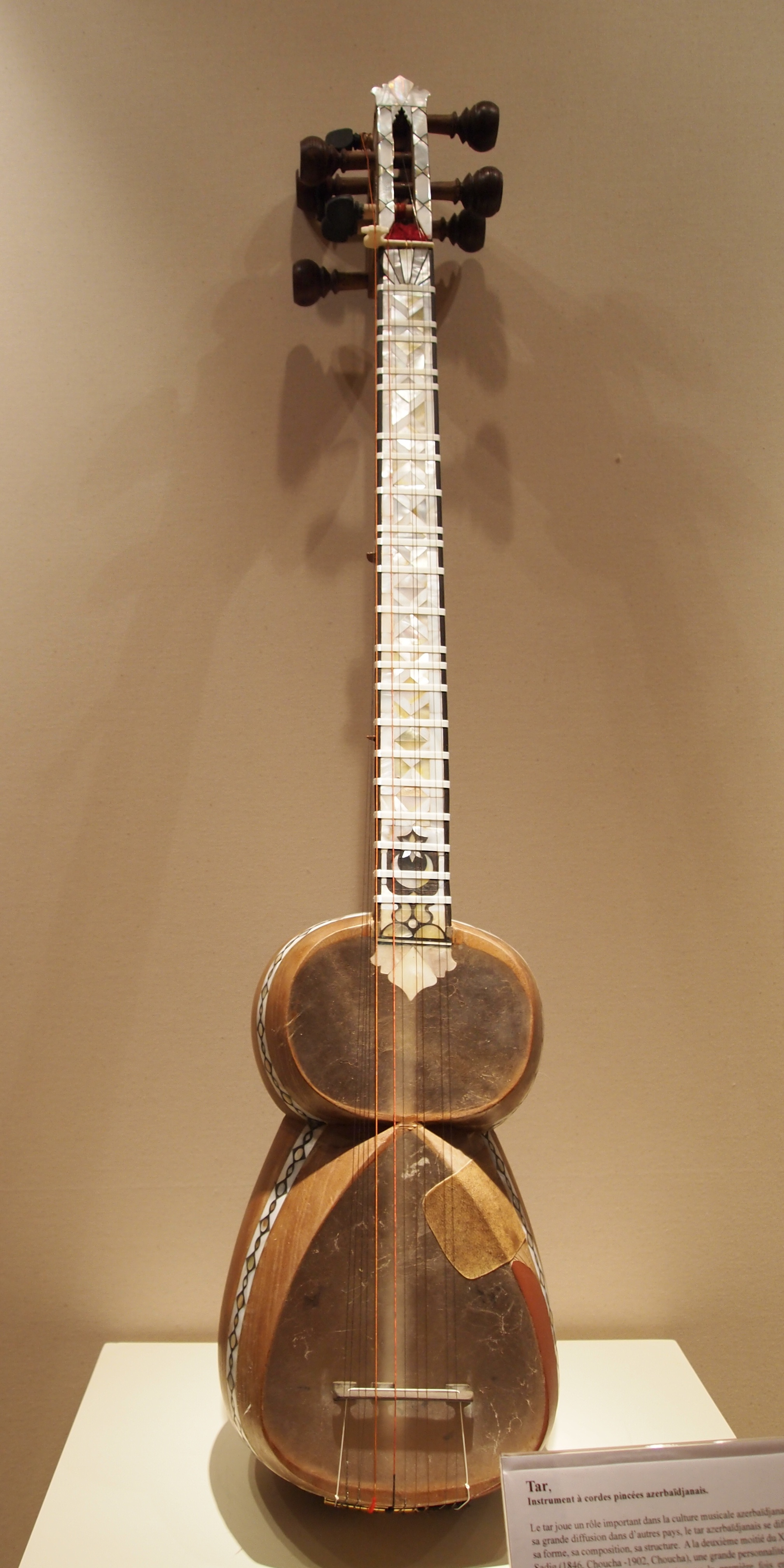 Tar instrument de musique à cordes pincées. Exposition Azerbaïdjan au musée de Cognac nov 2012